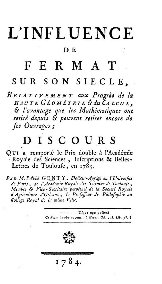 L'influence de Fermat sur son siecle, relativement aux progrès de la haute géométrie & du calcul, & l'avantage que les mathématiques ont retiré depuis & peuvent retirer encore de ses ouvrages; discours qui a remporté le prix double à l'Académie royale des sciences, inscritions & belles-lettres de Toulouse, en 1873. Par l'abbe Genty ... par M. l' abbé Genty …. - A Orléans : de l'imprimerie de Couret de Villeneuve ... ; & à Paris : chez Nyon, libraire, rue du Jardinet, & Cuchet, libraire, rue & hôtel Serpente, 1784. - VII, [1], 144 p. ; 8º .